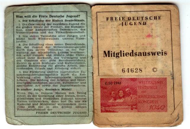 Erste Innenseite eines Mitgliedsausweises der FDJ aus dem Jahre 1948